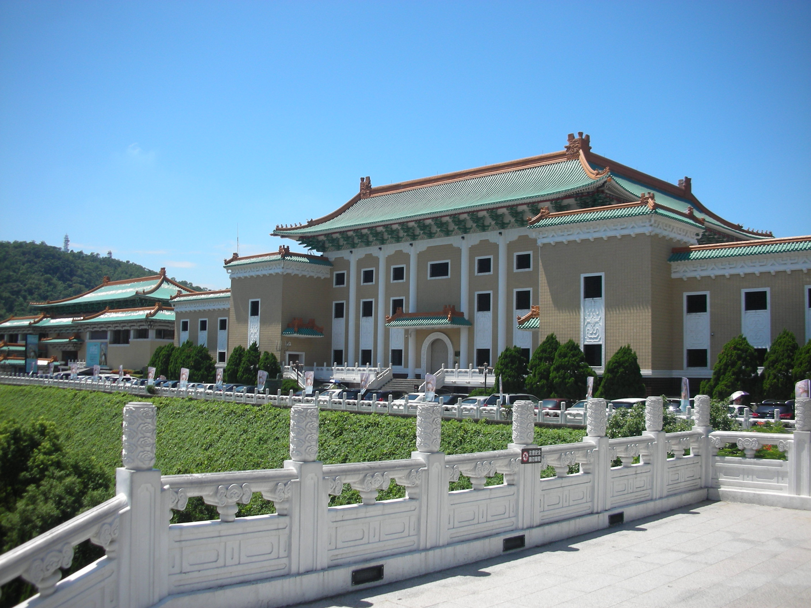 國立故宮博物院